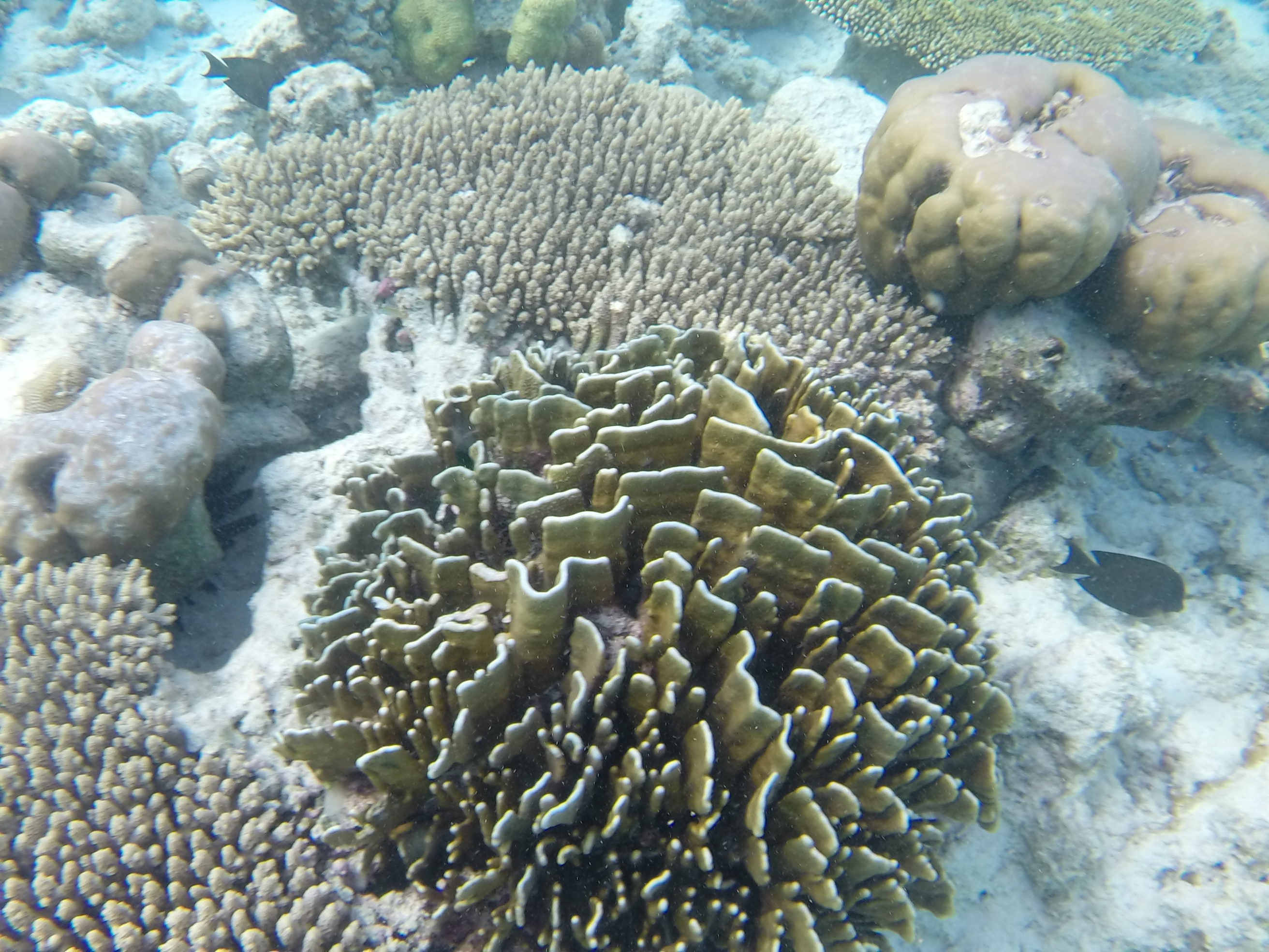 Une colonie de corail bleu Heliopora coerulea aux Maldives (Landaagiraavaru, Atoll de Baa).